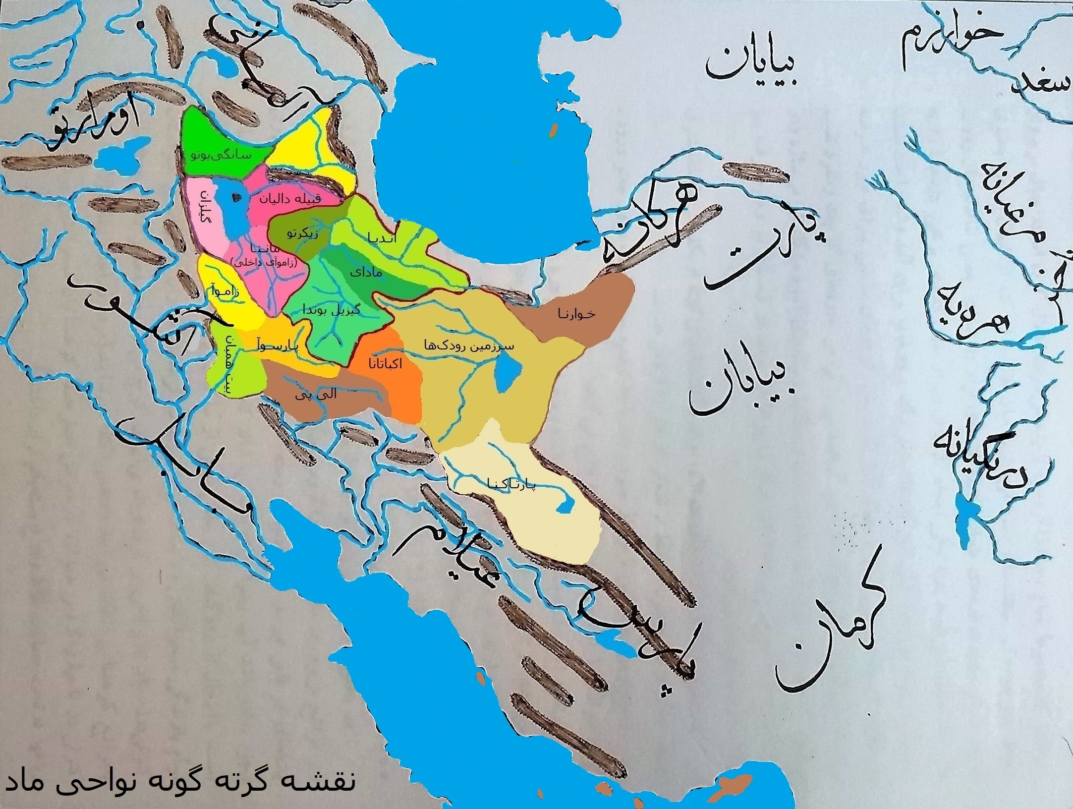 نقشه گرته گونه از نواحی پیش از تاسیس پادشاهی ماد